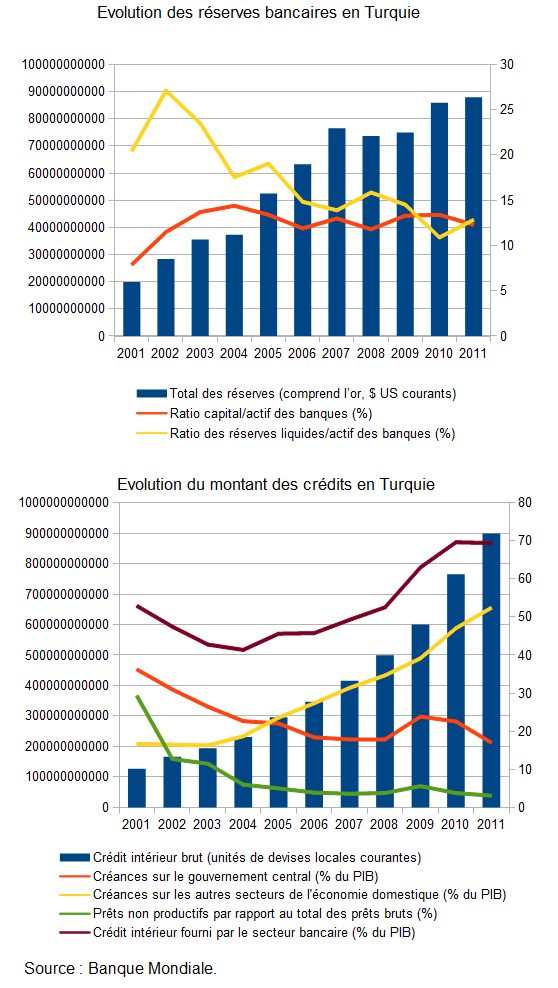 Évolution des réserves bancaires et des crédits en Turquie - Source: Banque Mondiale